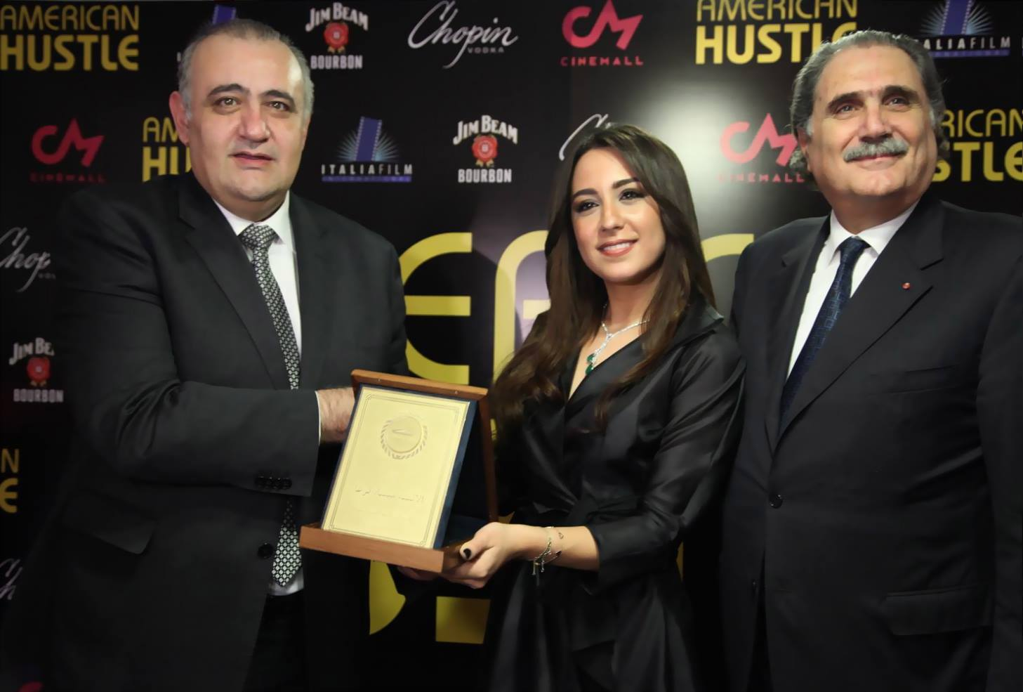 Gaby Layoun Mayssa Karaa receiving Lebanon Cultural Award